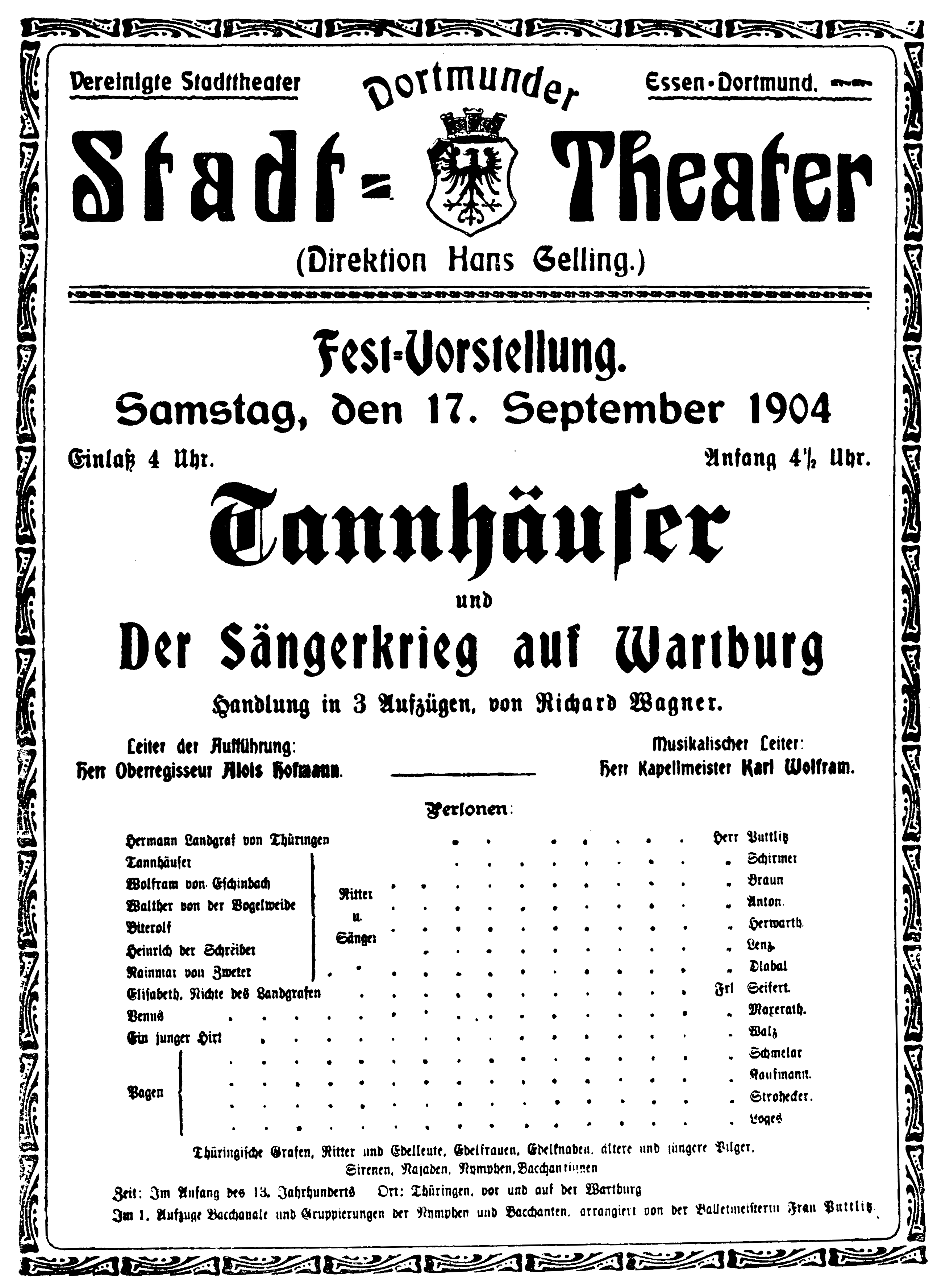 Dortmund, Städtische Bühnen, Stadttheater, Oper, Programmzettel zur Eröffnung